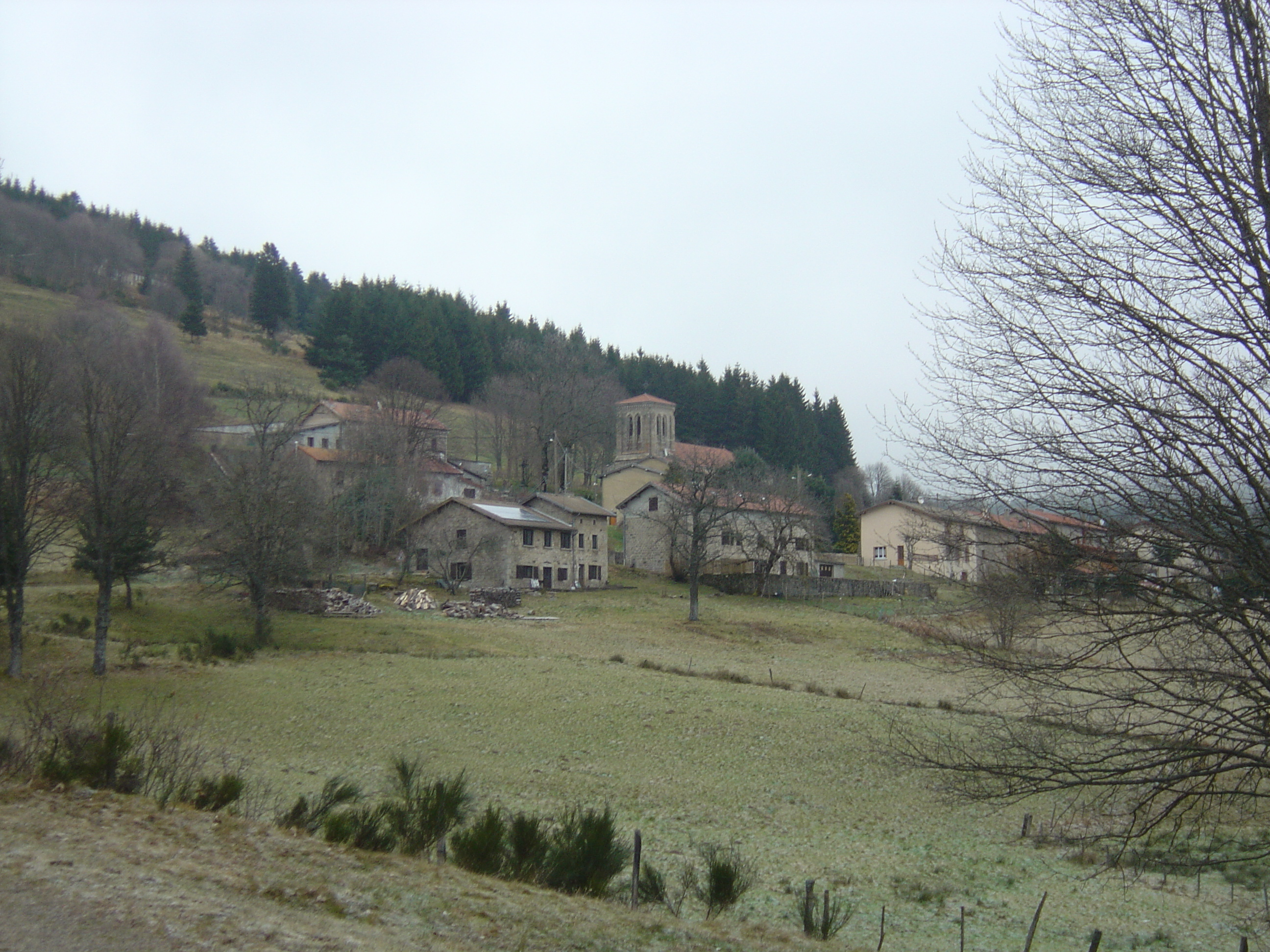 Village de la Chamba ( Loire; 42; Haut-Forez)